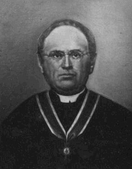 Josef Mikula (1816 - 1881), Český kněz a teolog.